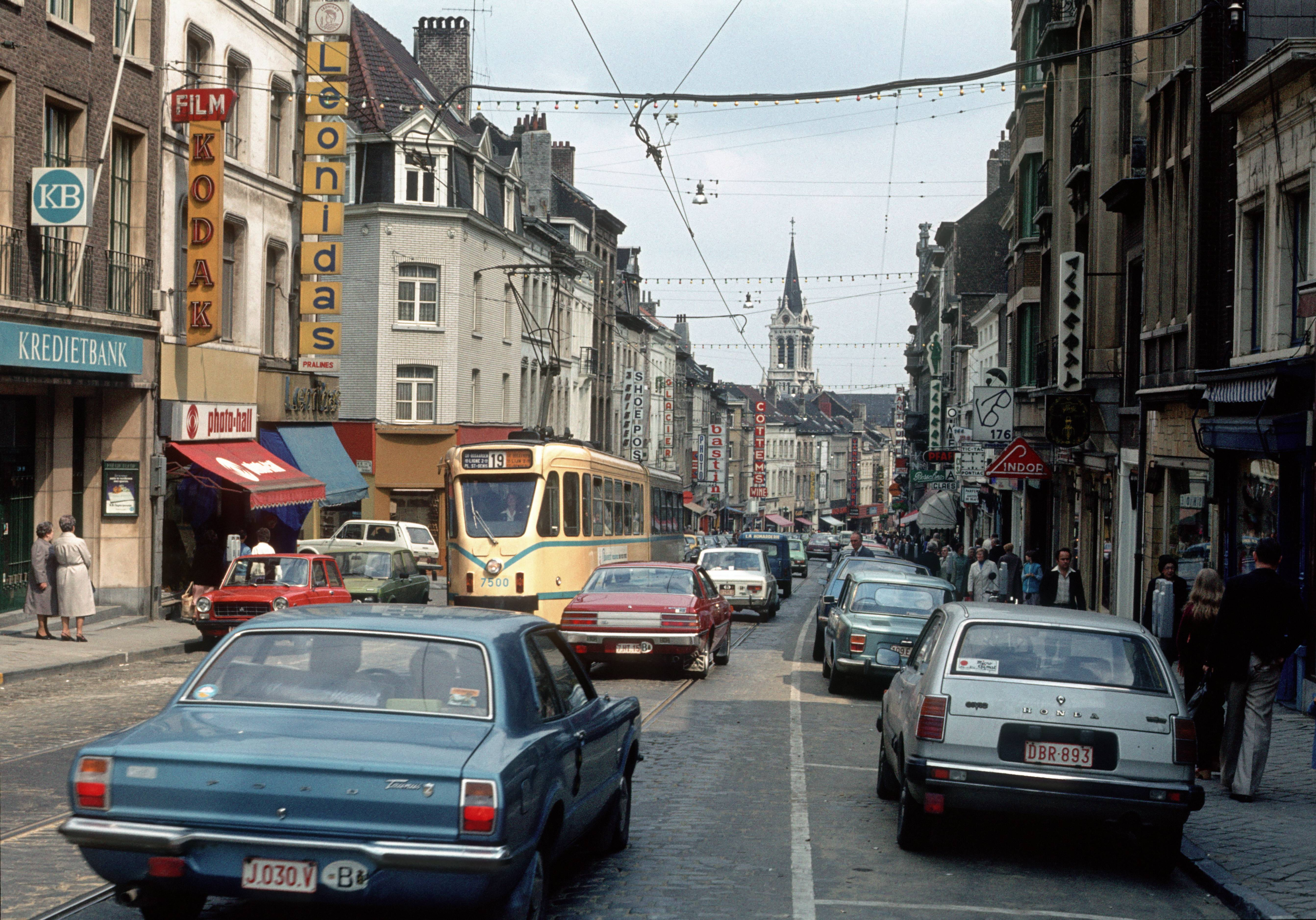 Chaussée de Waterloo, Saint-Gilles